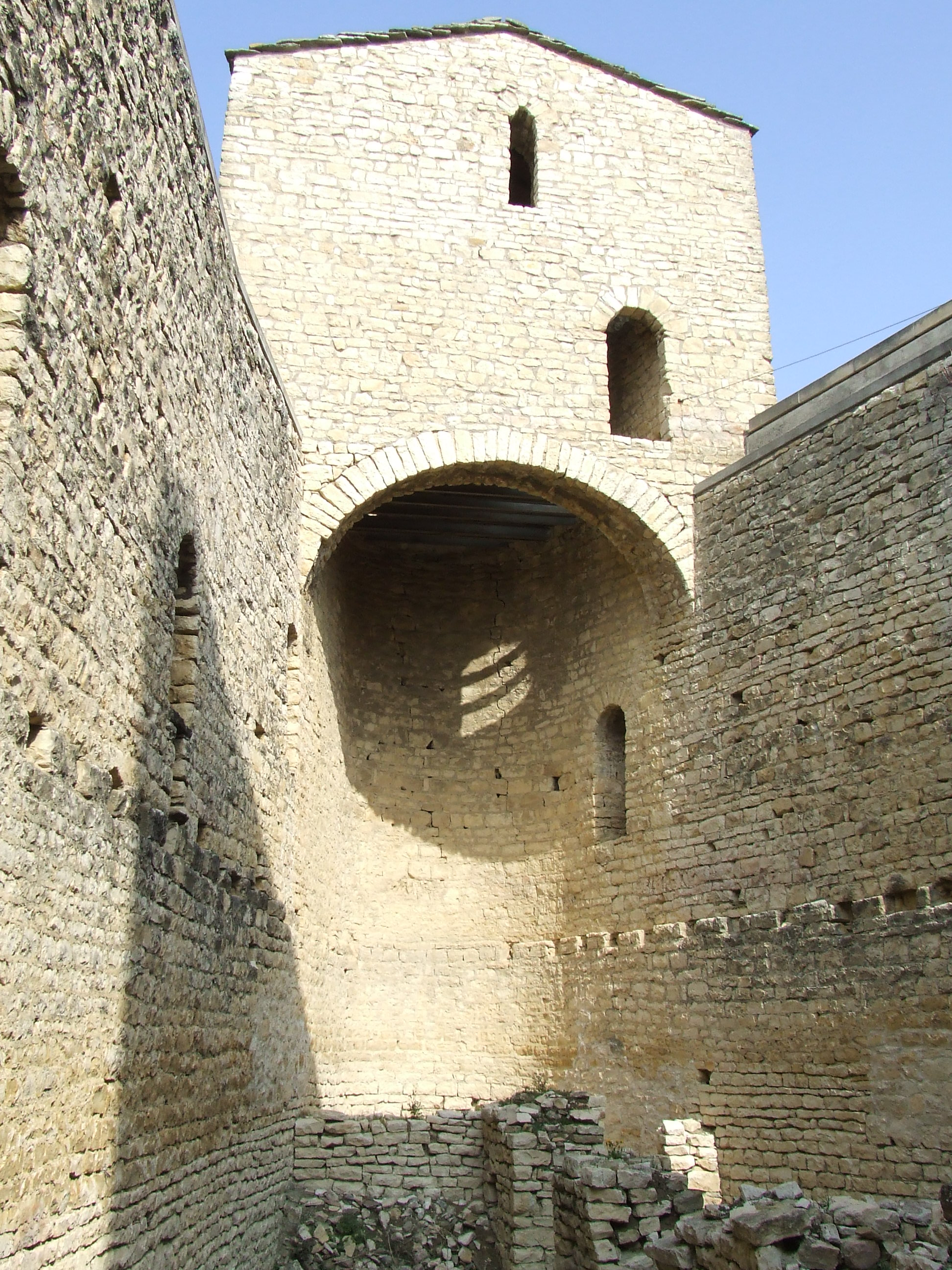 Espai senyorial del castell de Mur (Castell de Mur, Pallars Jussà)